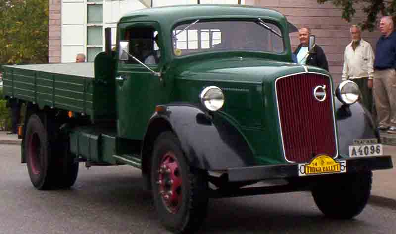 Volvo LV192D Truck 1940